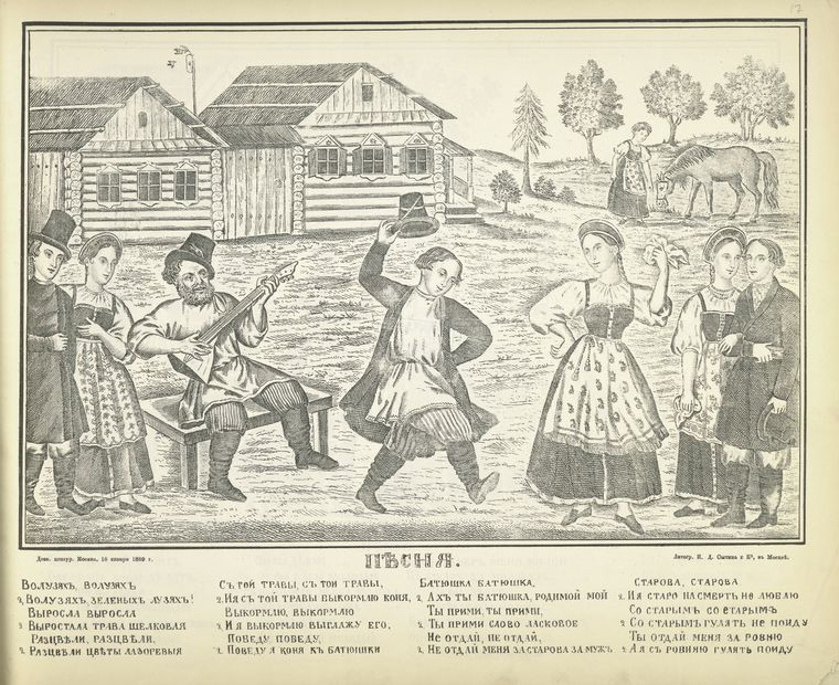 Пляска. Русский лубок. XIX век.